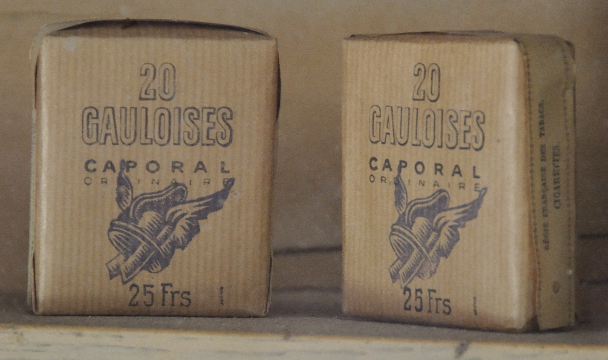 Anciens paquets de cigarettes Gauloises conservés au château de La Ferté Saint-Aubin.